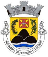 Escudo de ouro, monte de três cômoros de negro, nascente de uma ponta ondeada de prata e azul de três tiras; em chefe, a Cruz da Ordem de Cristo; nos flancos, à dextra ramo de pinheiro e à sinistra ramo de eucalipto, ambos de verde e frutados. Coroa mural de prata de três torres. Listel branco com a legenda a negro, em maiúsculas: "FREGUESIA de FERREIRA do ZÊZERE".